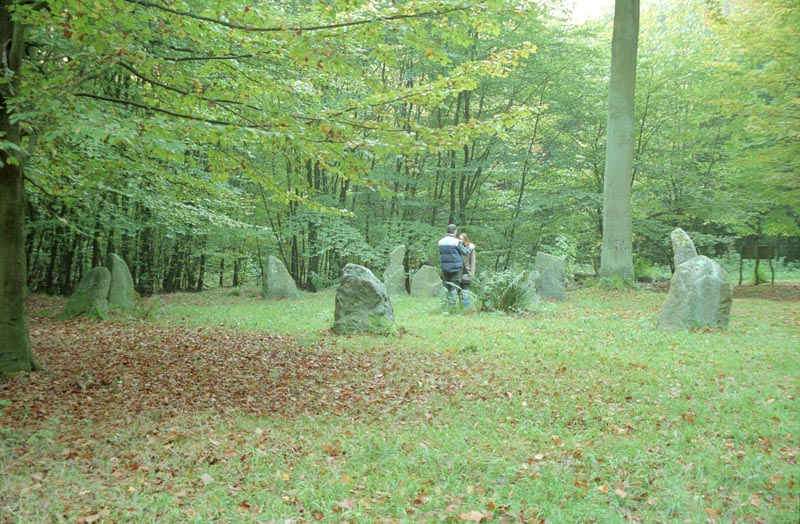 Mittlerer Kreis des Boitiner_Steintanz